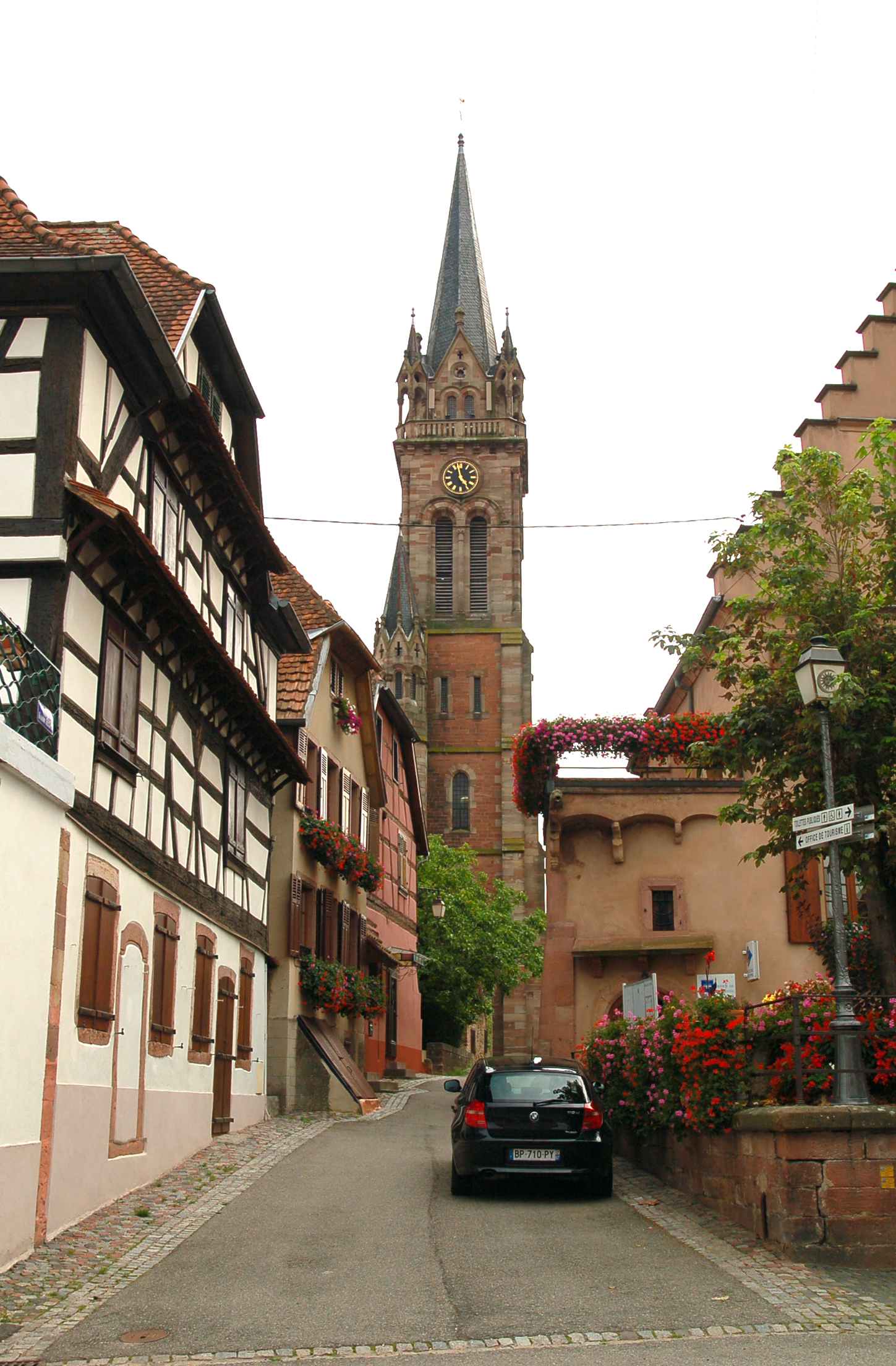 Dambach-la-Ville, Alsace, France